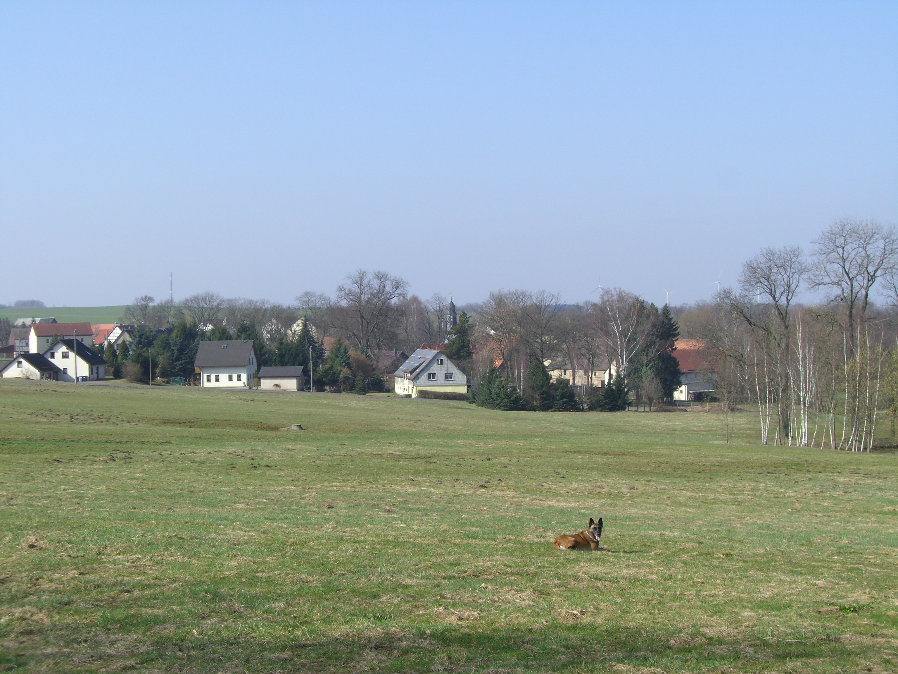 Oberschaar, Ansicht vom Bahndammwanderweg